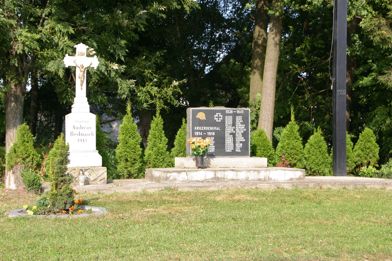 Leśnik (dodatkowa nazwa w j. niem. Leschnig) – wieś w Polsce położona w województwie opolskim, w w powiecie prudnickim, w gminie Głogówek.